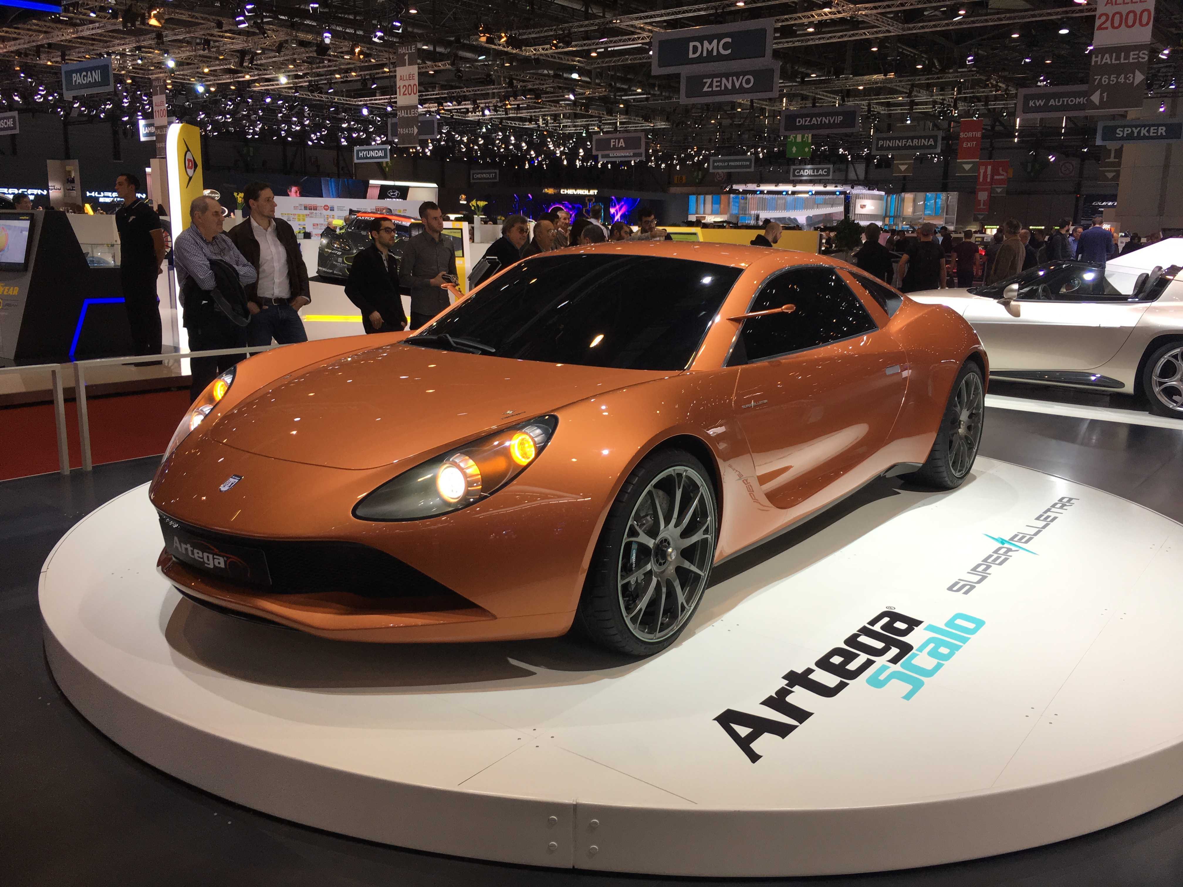 Geneva Auto Salon 2017